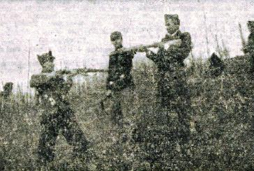 Partizani Vojske državne varnosti (VDV) pri vajah z orožjem v Beli krajini.